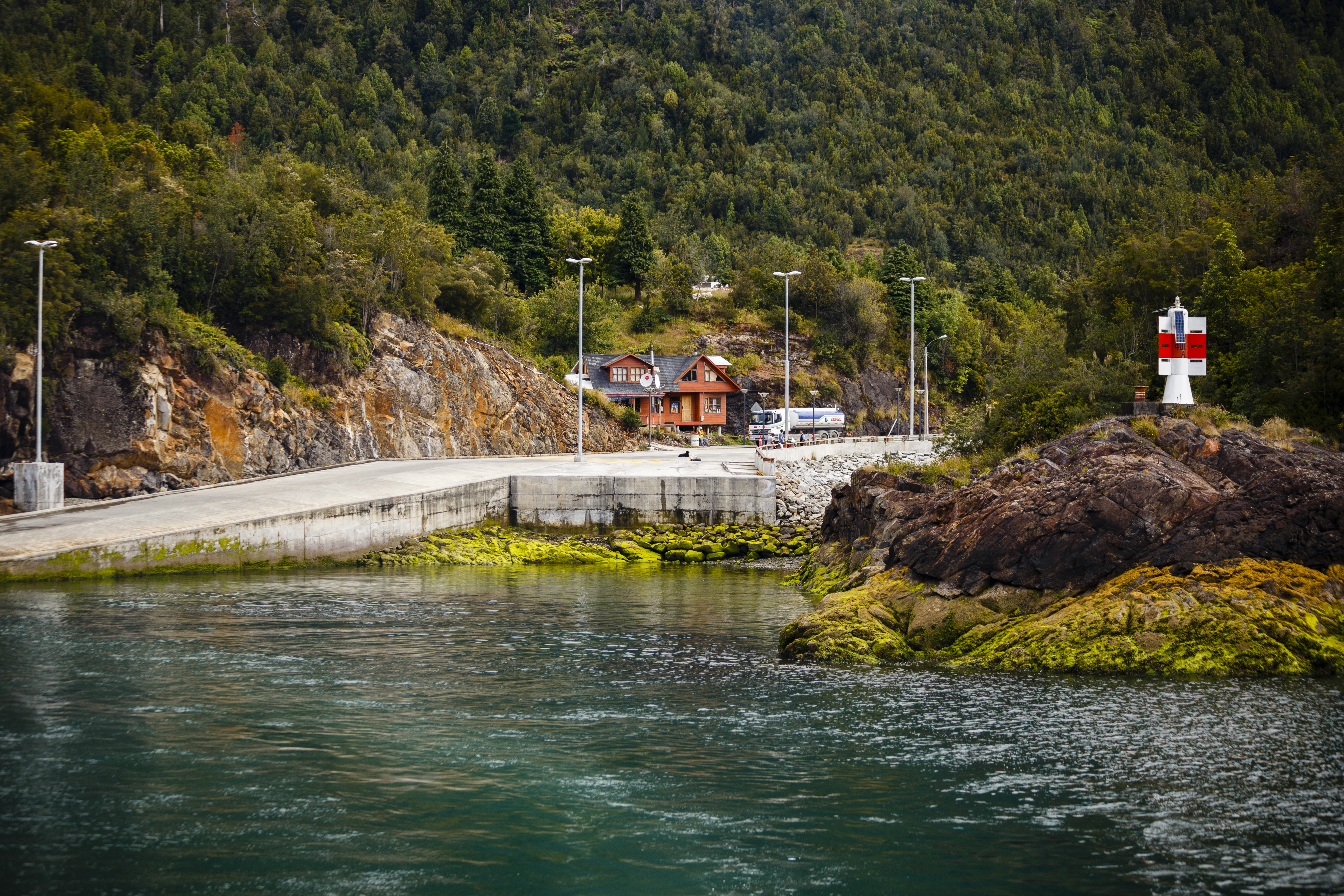 Caleta Puelche, Hualahué, Chile.